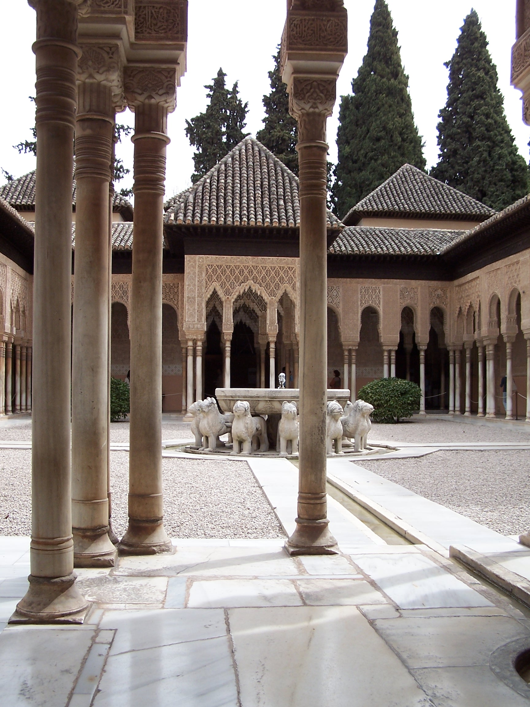 Vista general del Patio de los Leones. Alhambra, Granada, España.